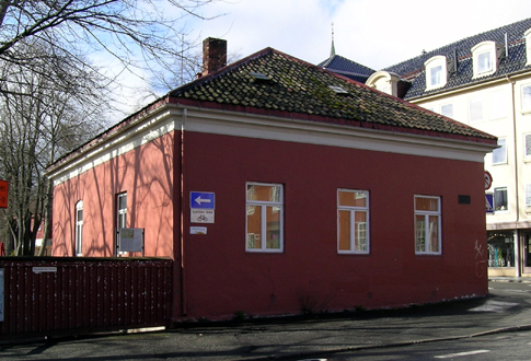 Bruvaktbygningen, Gamle bybro, Trondheim. Bygd. 1795. Fredet.